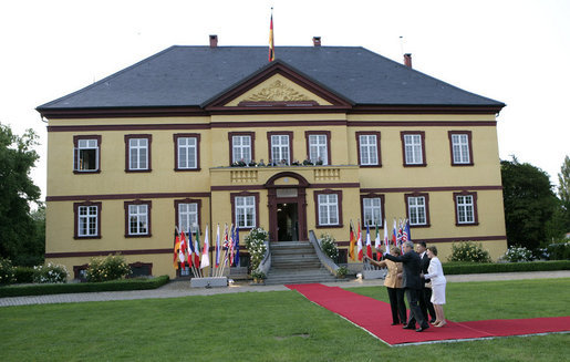 Angela Merkel begrüßt George W. Bush bei der Ankunft vorm Gut Hohen Luckow am 6. Juni 2007 während des G8-Gipfels